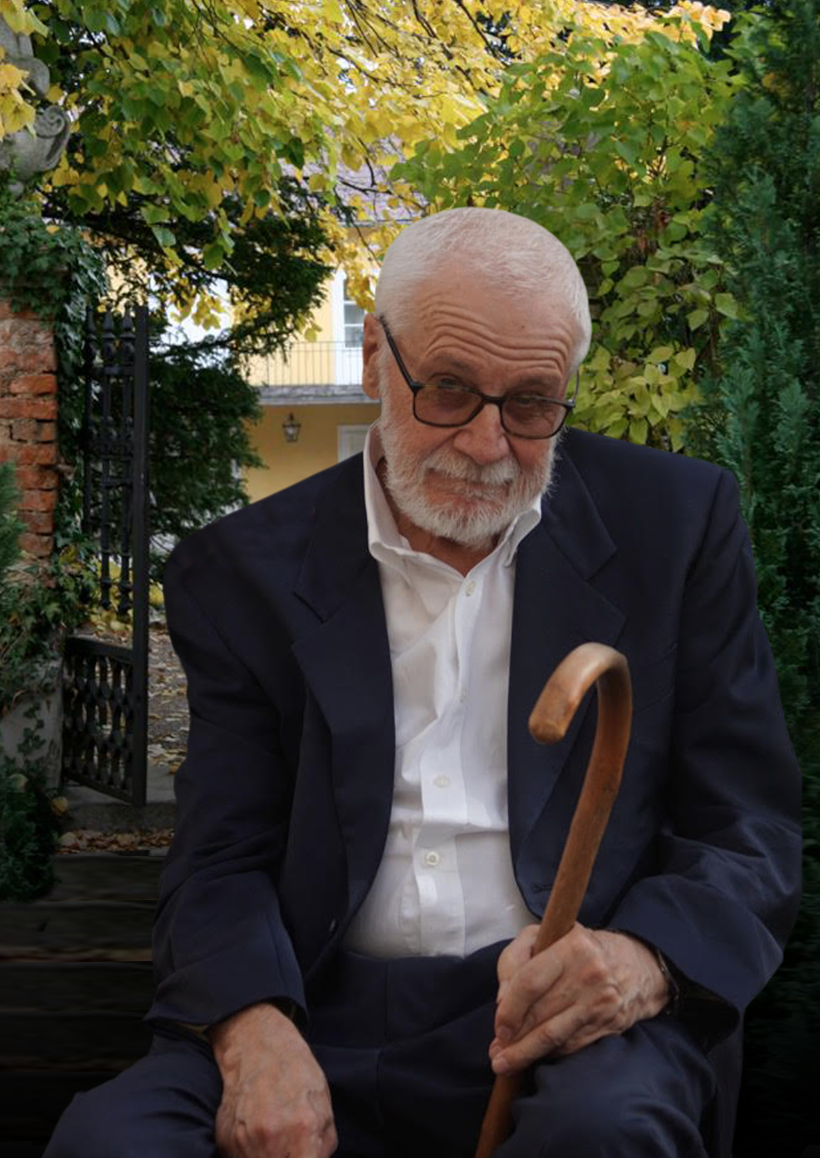 Collage mit Max Demeter Peyfuss in Maria Enzersdorf, im Garten seines Elternhauses, dem Anwesen von Demeter Th. Tirka, Max D. Peyfuss´ Urgrossvaters